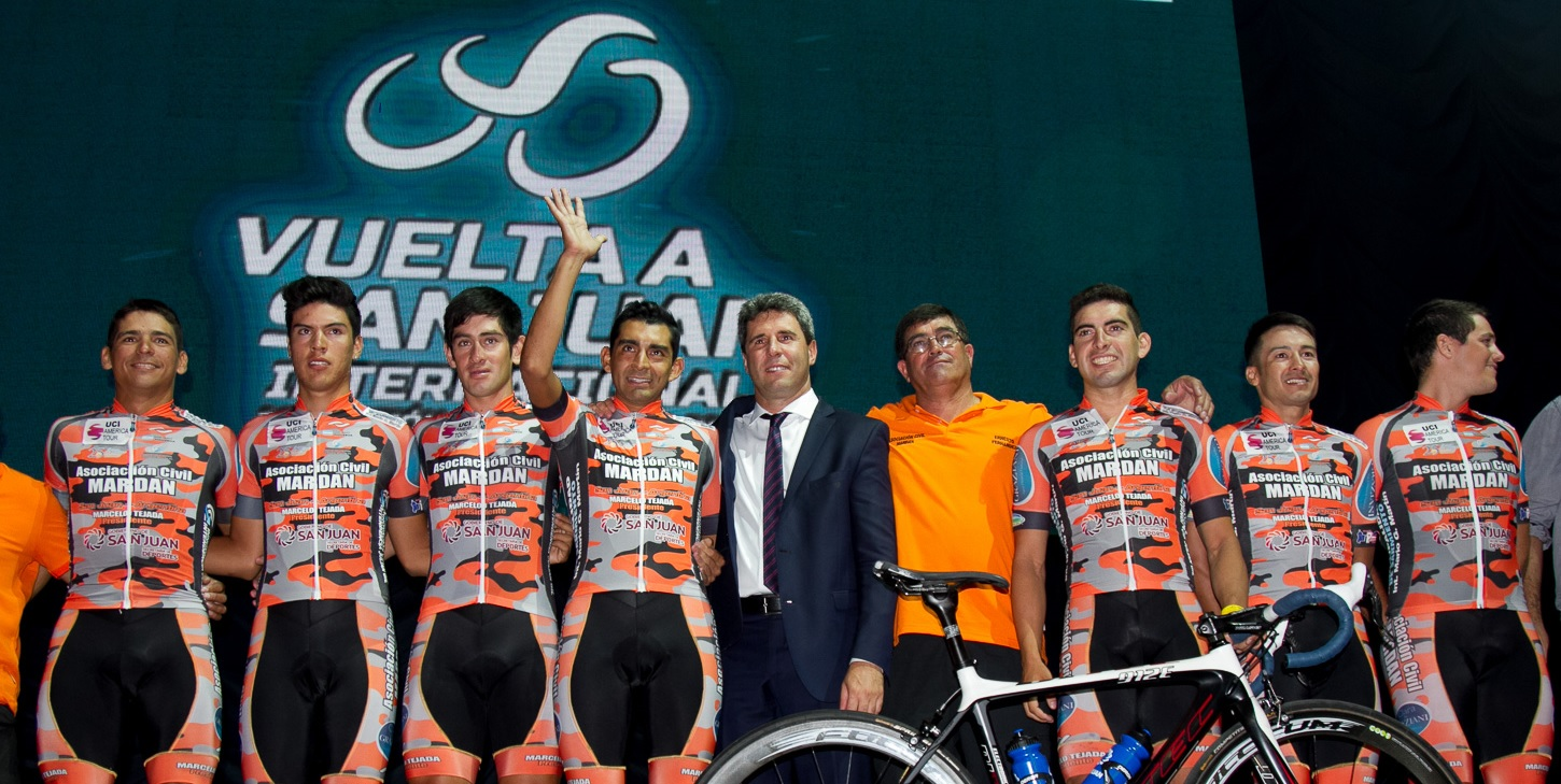 Vuelta a San Juan 2017 - Equipo Asociación Civil Mardan (Argentina) Depicted team: Asociación Civil Mardan